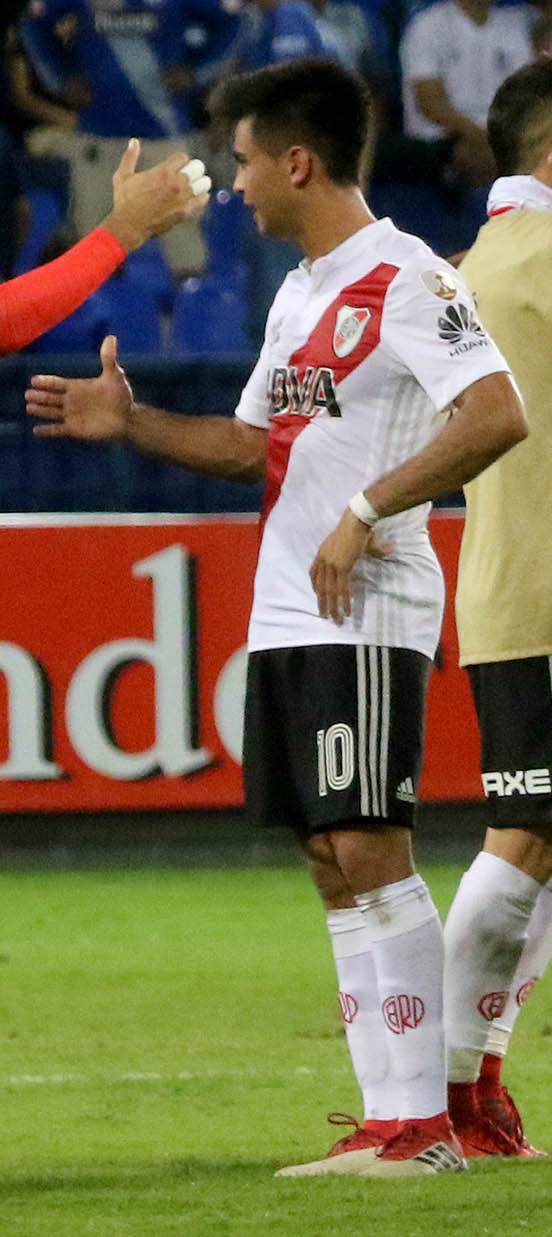 Guayaquil, jueves 19 de abril del 2018 (Andes).-En el estadio Capwell, Emelec enfrenta a River Plate, en partido del grupo D de la Copa Libertadores.Foto:César Muñoz/Andes